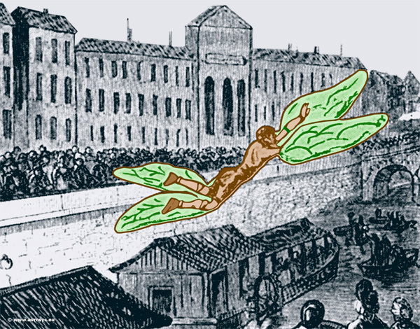 Gravura do século XVIII (de autor ignorado) mostrando Jean-François Boyvin de Bonnetot, o Marquis de Bacqueville, em um voo planado, no dia 19 de março de 1742